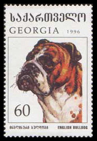 Почтовая марка Грузии. Английский бульдог, 1997